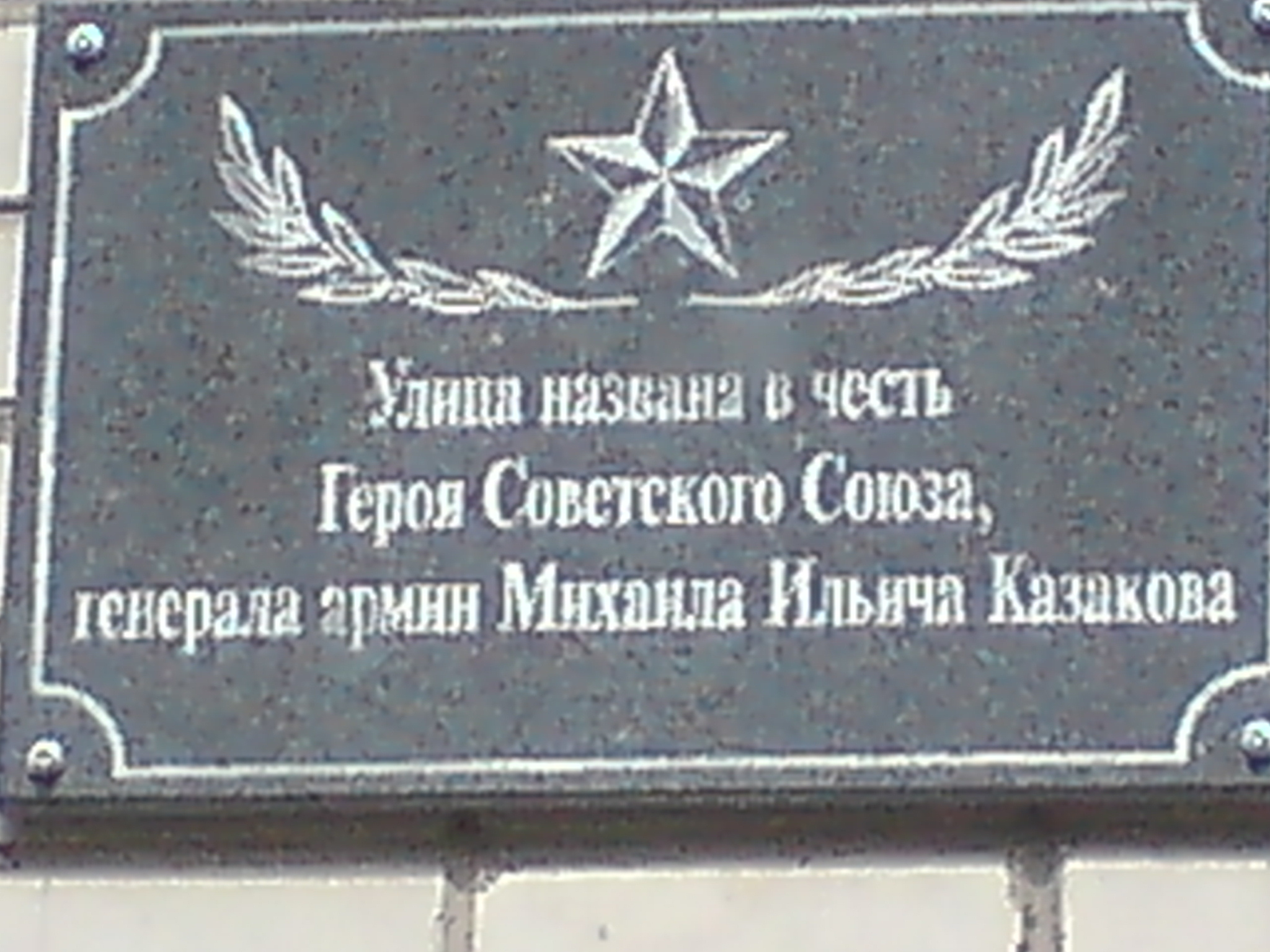 Памятная доска по адресу г.Вологда, Пошехонское шоссе, д.26 - торец выходящий на улицу Казакова